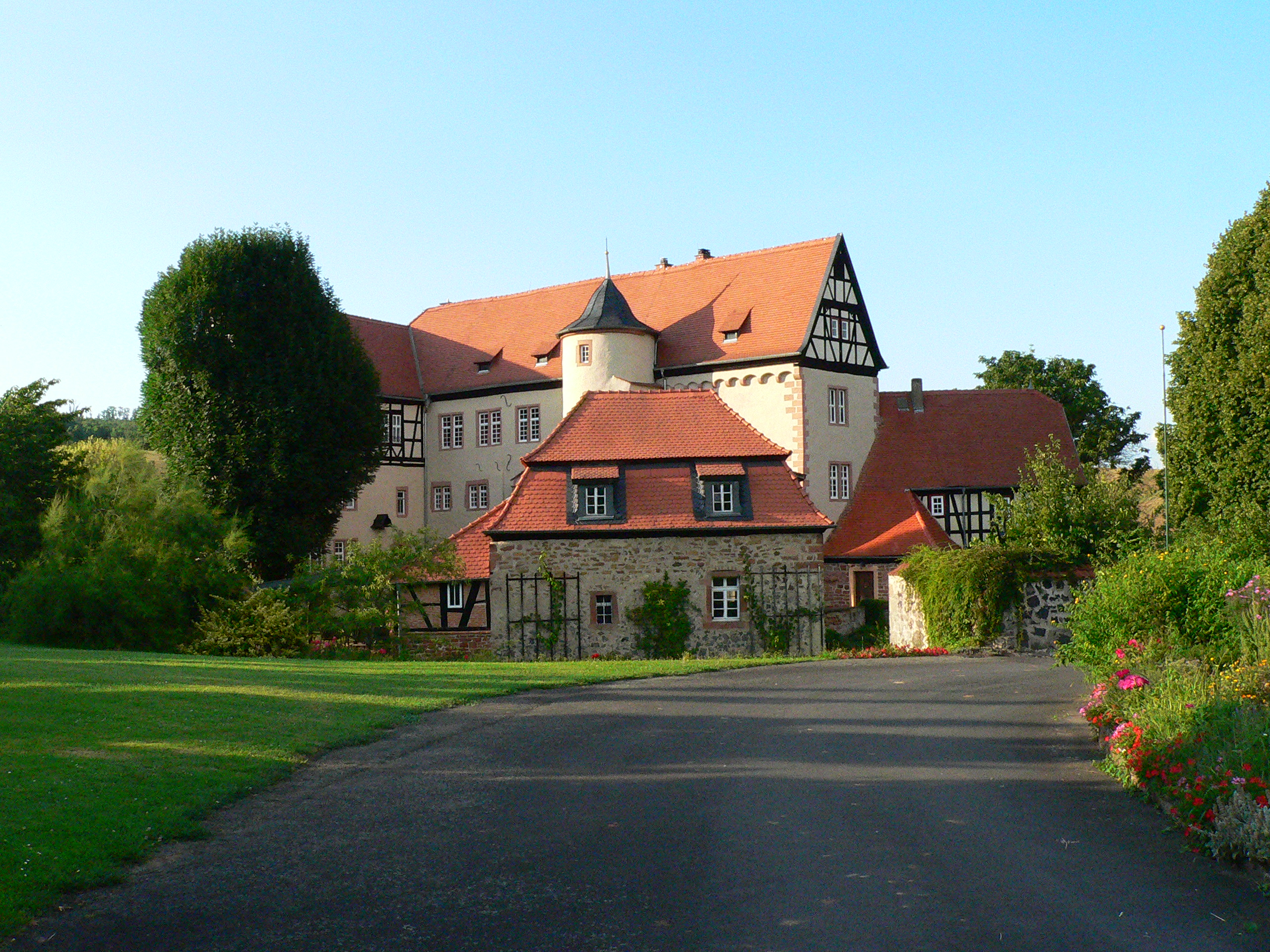 Hofgut Leustadt in Stockheim, Gemeinde Glauburg, Hessen, Deutschland